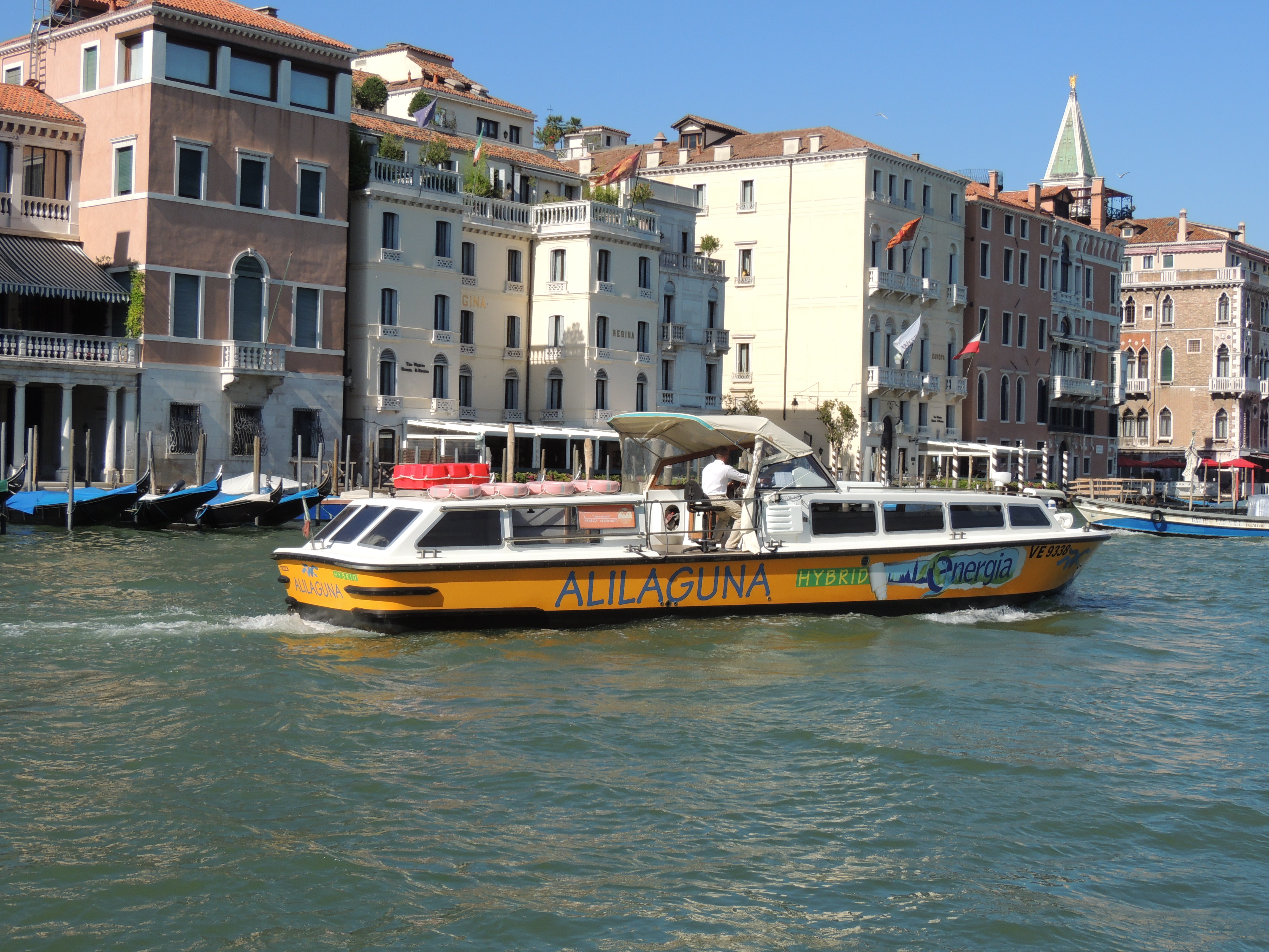 Alilaguna (Venice)